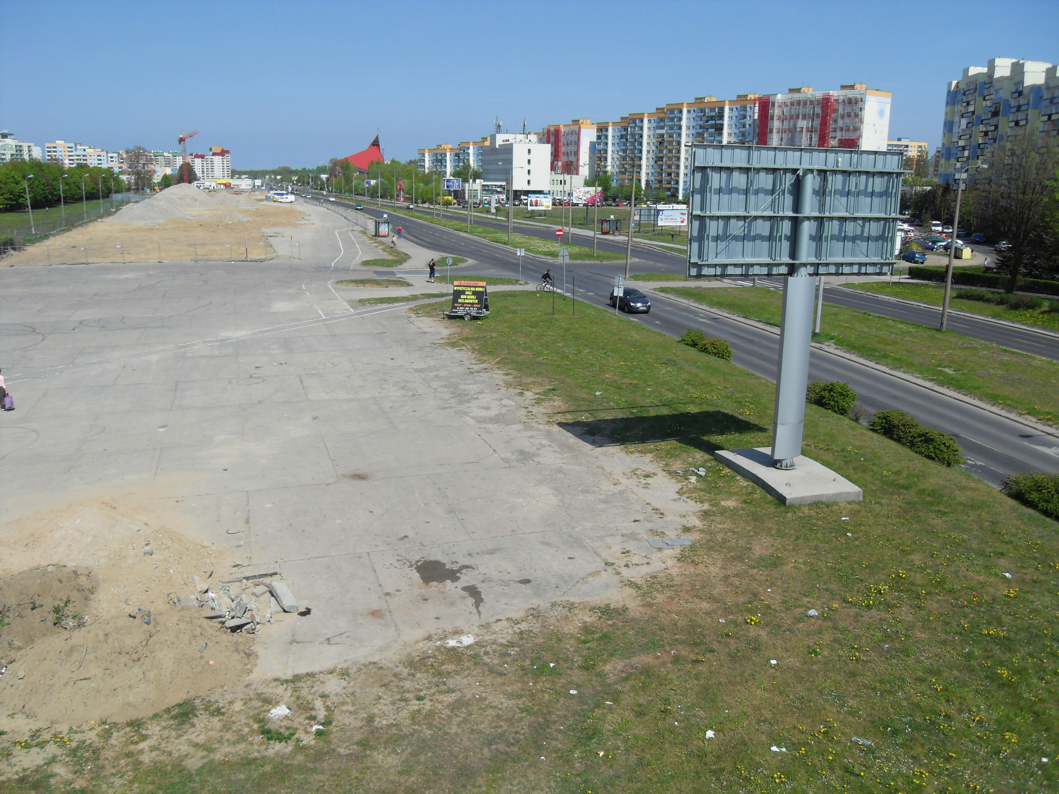 Gdańsk Zaspa, dawny pas startowy lotniska.